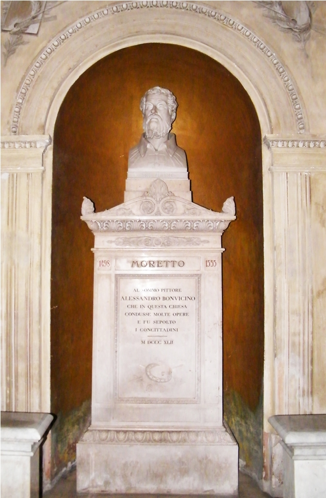 Monumento funebre del Moretto (Gaetano Matteo Monti) - Chiesa di S. Clemente - Brescia